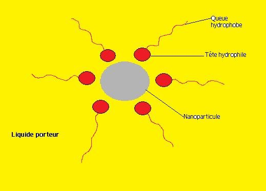 Le rôle du surfactant dans la liaison entre particule magnétique et solvant.